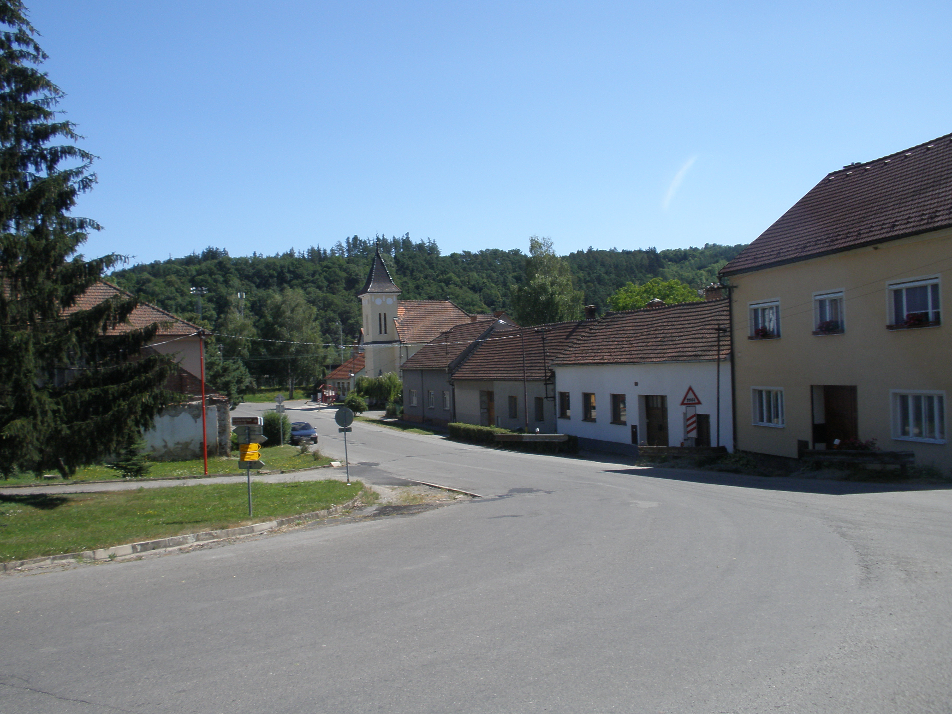 Skalice nad Svitavou; v pozadí kostel Navštívení Panny Marie